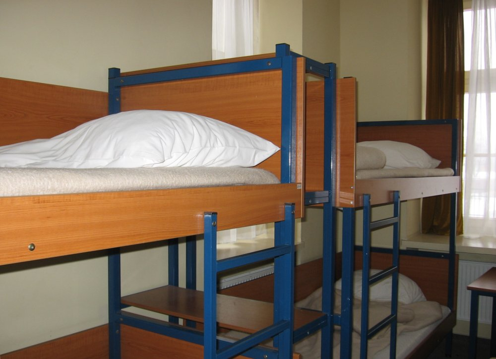 Pokój 4-osobowy. Schronisko PTSM przy hotelu Tumskim we Wrocławiu